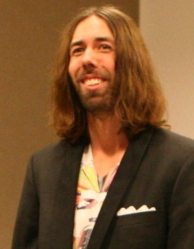 Micael Dahlén, professor vid Handelshögskolan i Stockholm.